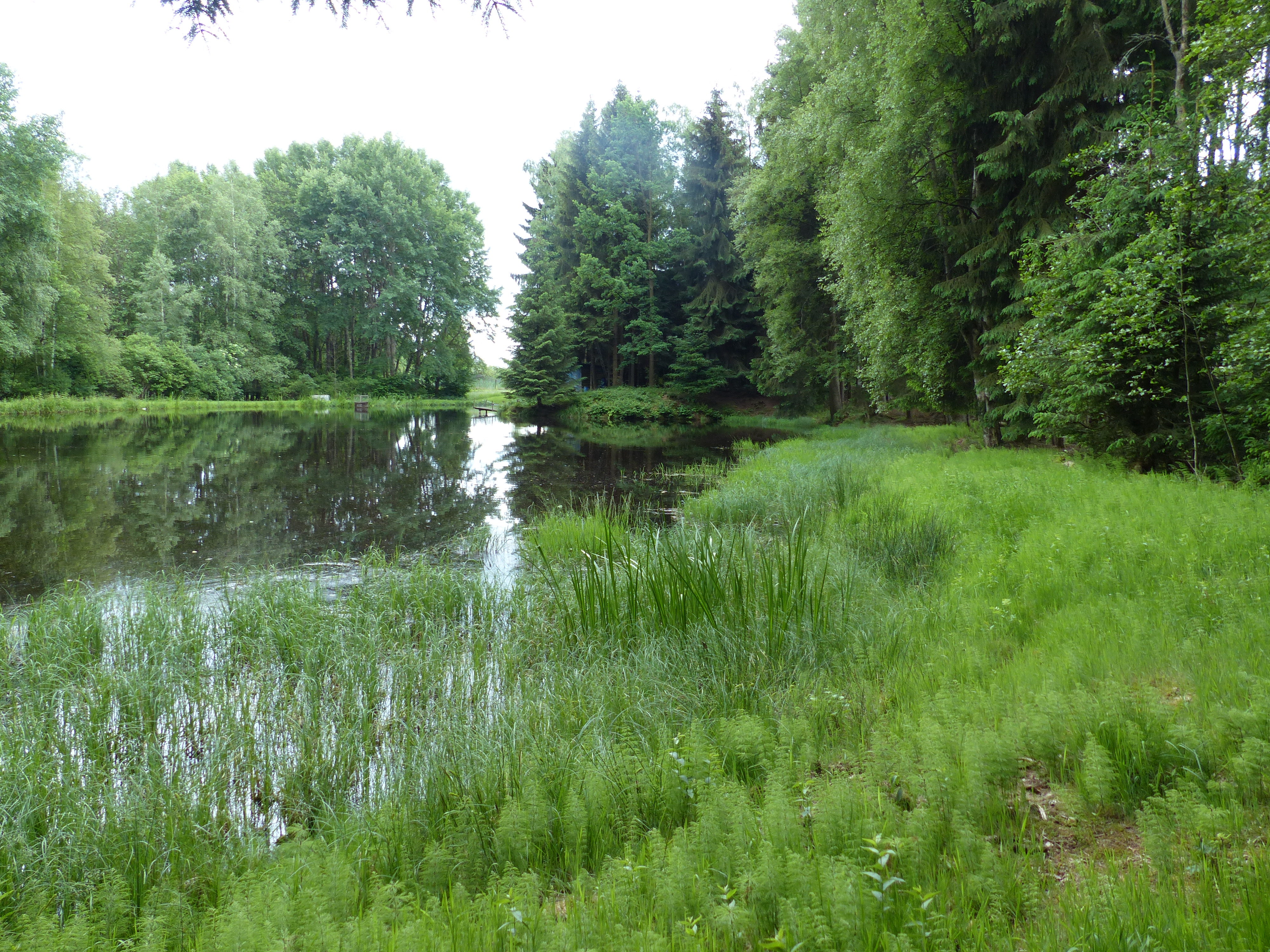 Zinngräben bei Kirchenlamitz